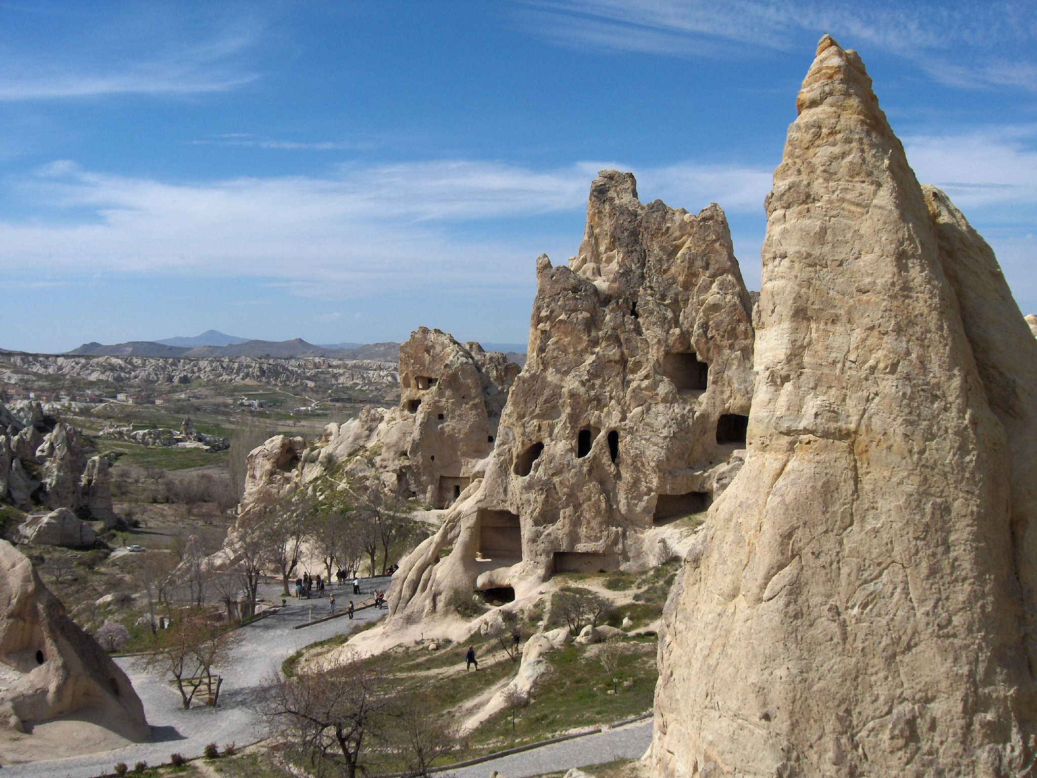 Göreme valley open air museum; Cappadocia, Turkey